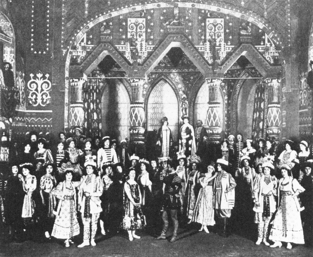 Dargomyzhsky - Rusalka - Opéra de Monte-Carlo 1909, act II, stage setting: Alphonse Visconti (1856-1941), director: Raoul Gunsbourg